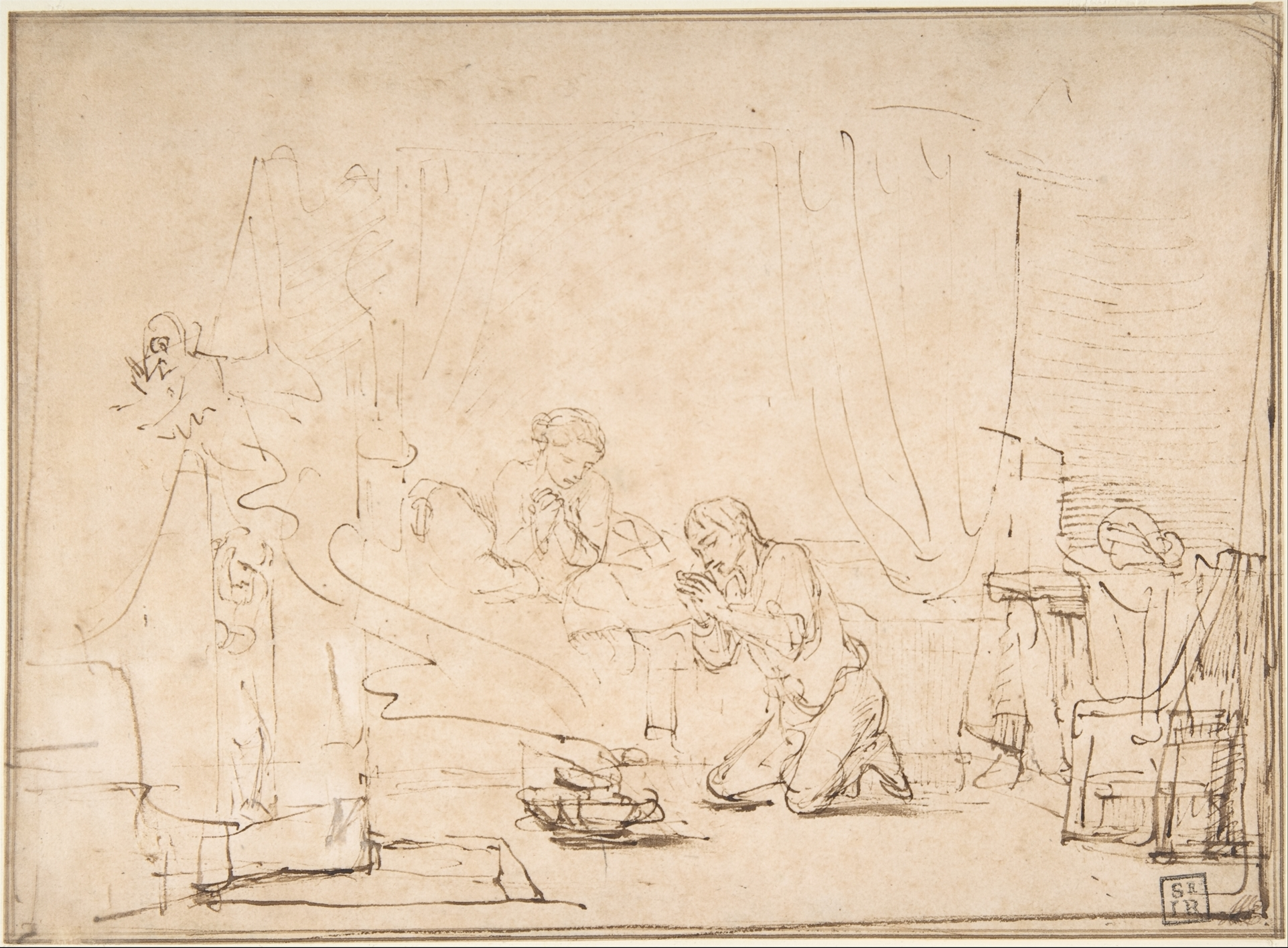 Drawing; Drawings